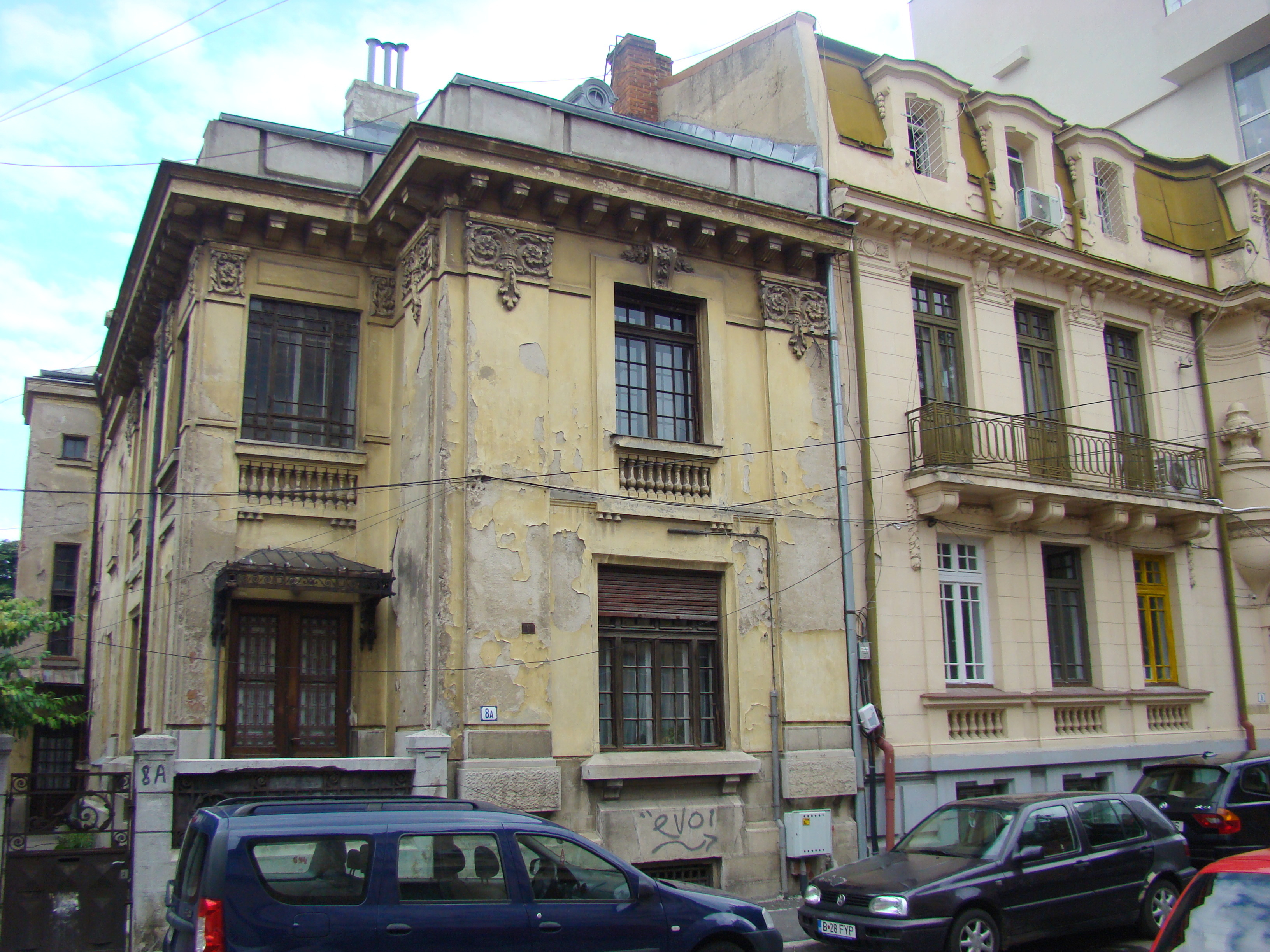 Casă monument istoric, str.Louis Blank, nr.8